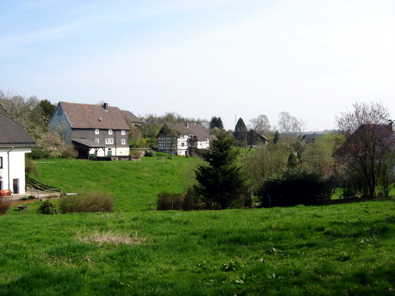 Hahn - Ortsteil der Stadt Waldbröl